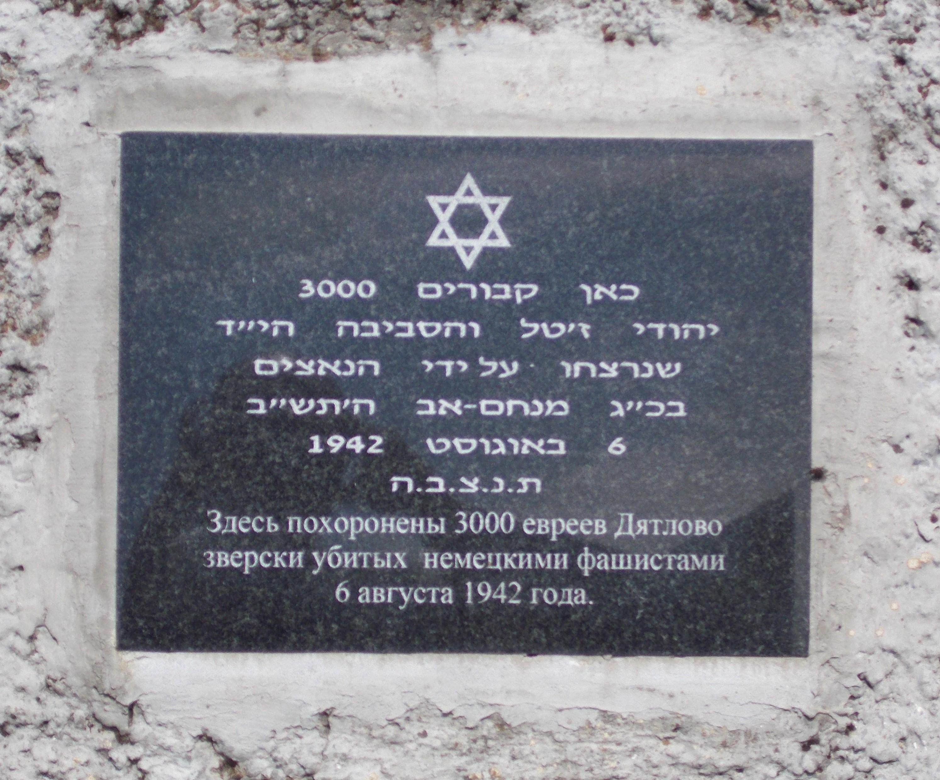 Еврейское кладбище в Дятлово (Гродненская область). Находится между улицами Октябрьская, Гагарина и Булата. На этом кладбище стоят памятники 3000 евреям Дятлово, убитым на этом месте 6 августа 1942 года, 54 евреям из деревни Дворец, убитым нацистами в 1942 году и похороненным здесь, а также место захоронения праха еврея-партизана Ескеля Атласа.